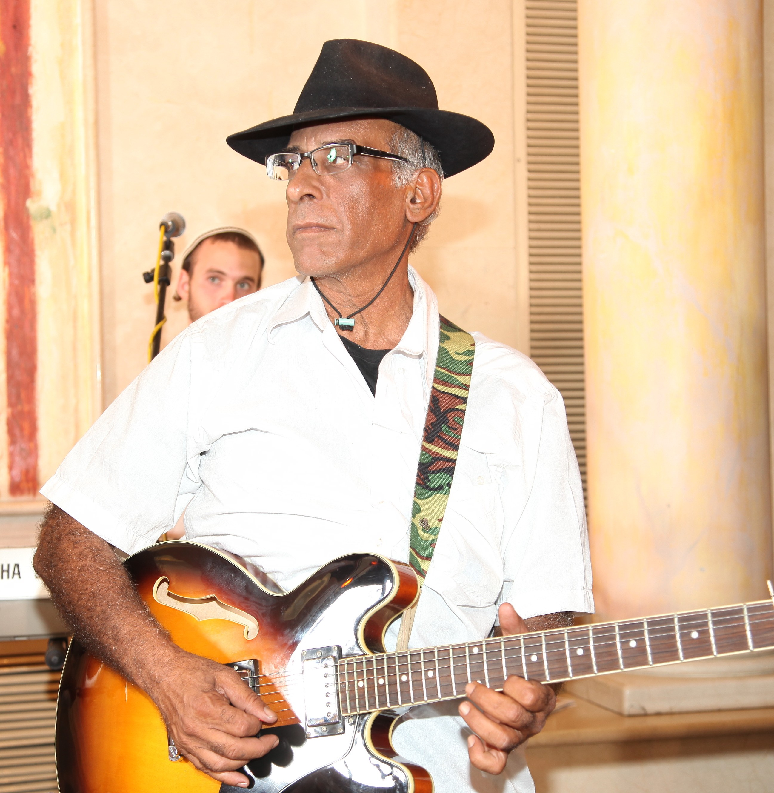 yehudakesar